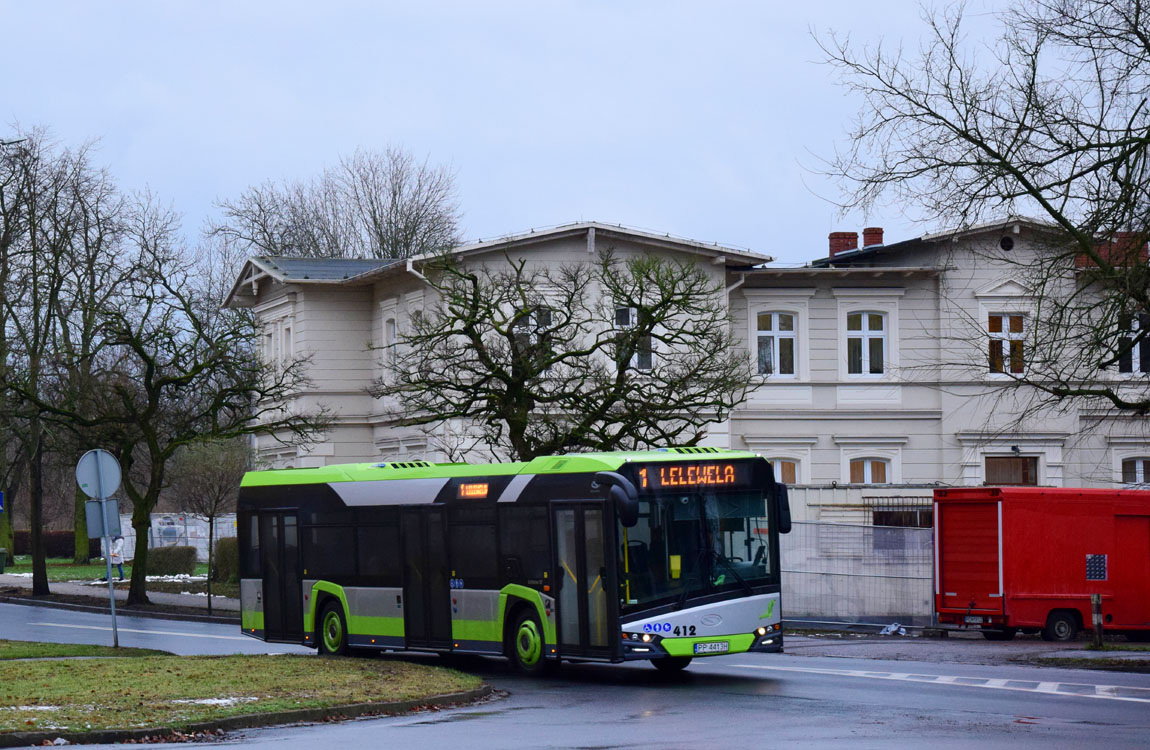 Solaris w nowych barwach, obowiązujących od 2016.